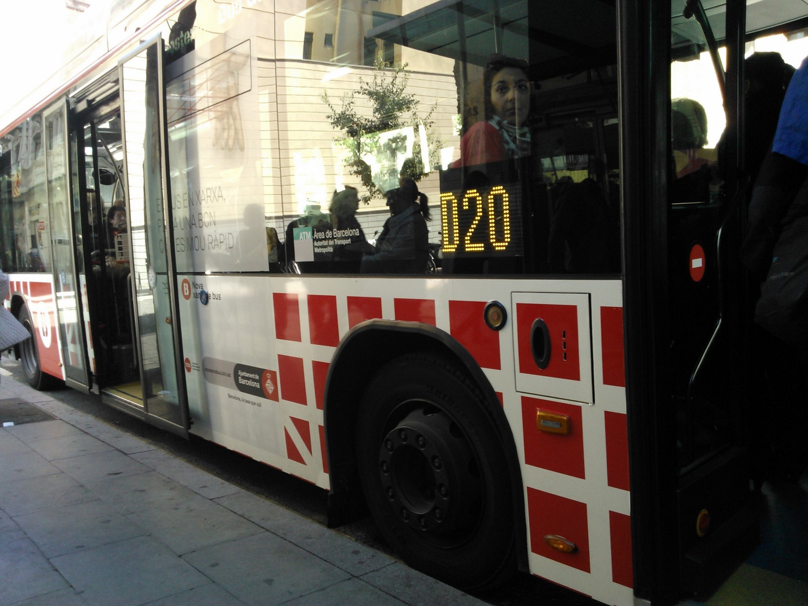 Autobús de la XOAB D20.